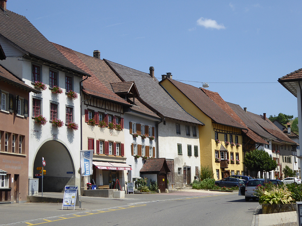 Wilchingen SH